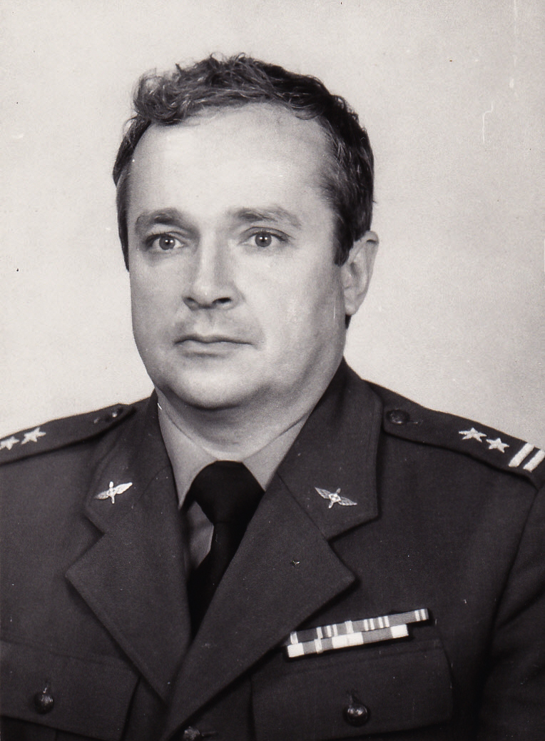 Zygmunt Wilczek w latach 90. XX wieku